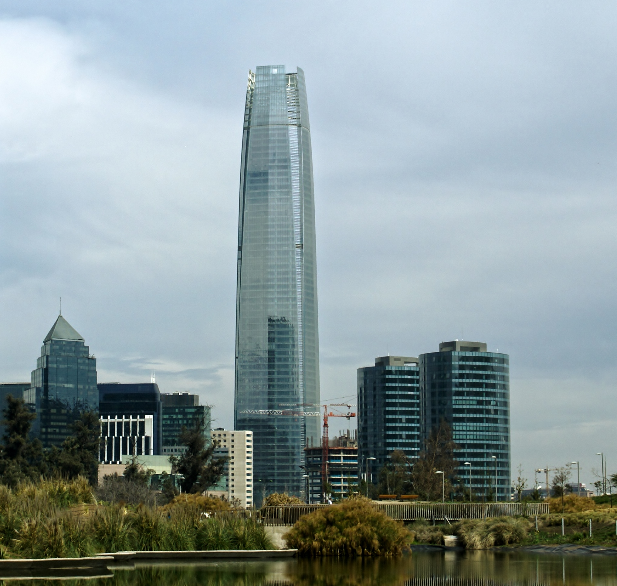 imagen de la gran torre santiago desde el parque bicentenario de vitacura